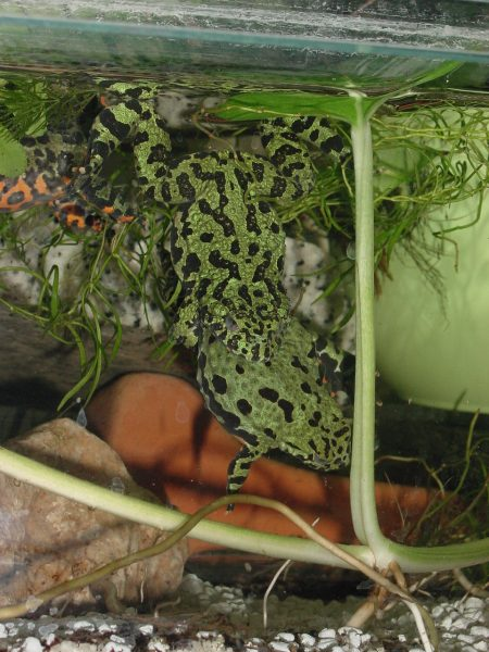 Chinesische Rotbauchunke im Amplexus. Author: Klemens Bottig Source: Eigene Fotografie